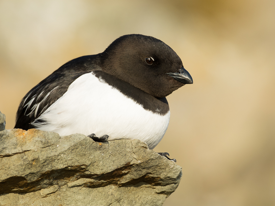 Kleine Alk. Gefotografeerd op Spitsbergen.